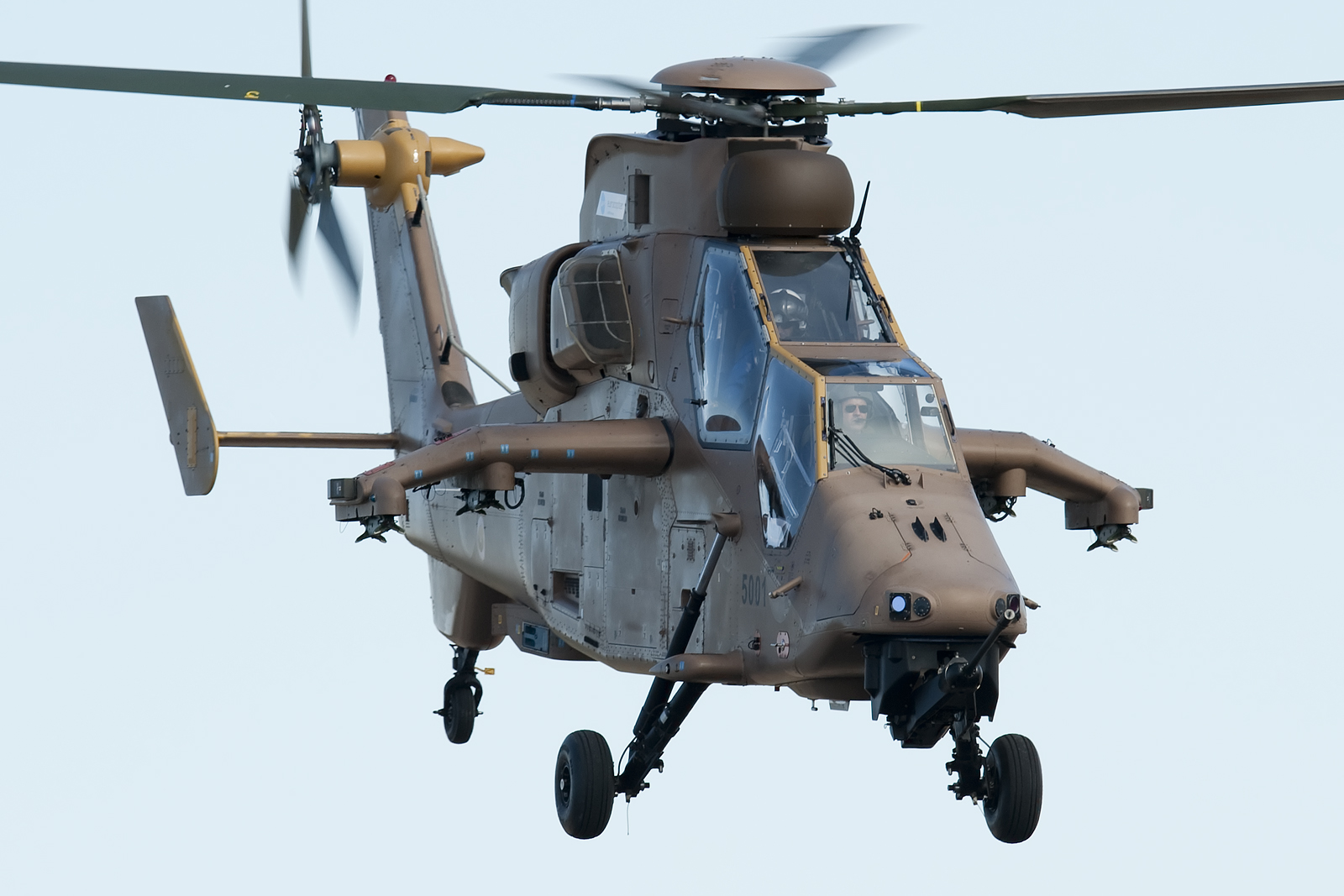 TLP 2012-5